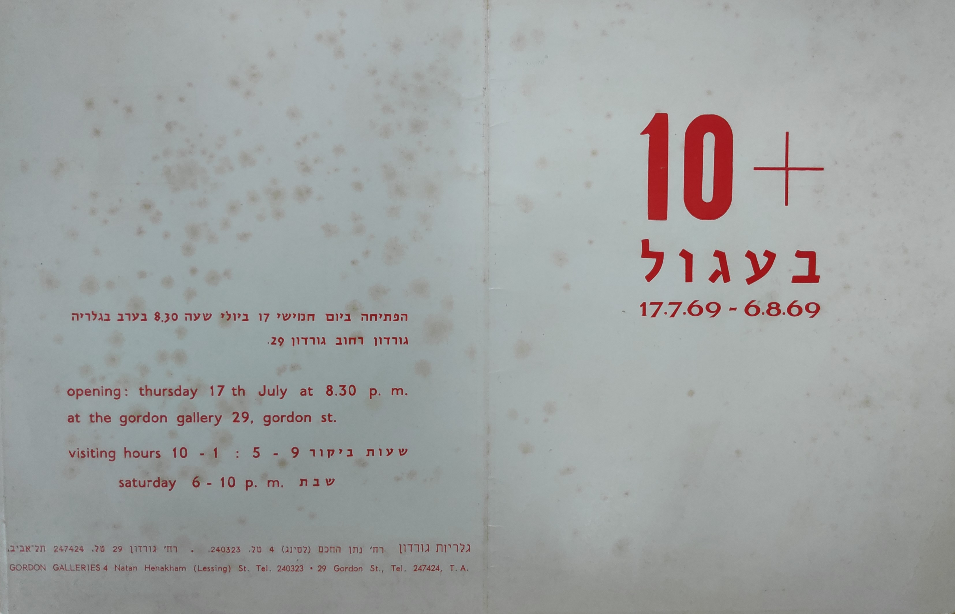 מתוך האוסף של בנו כלב